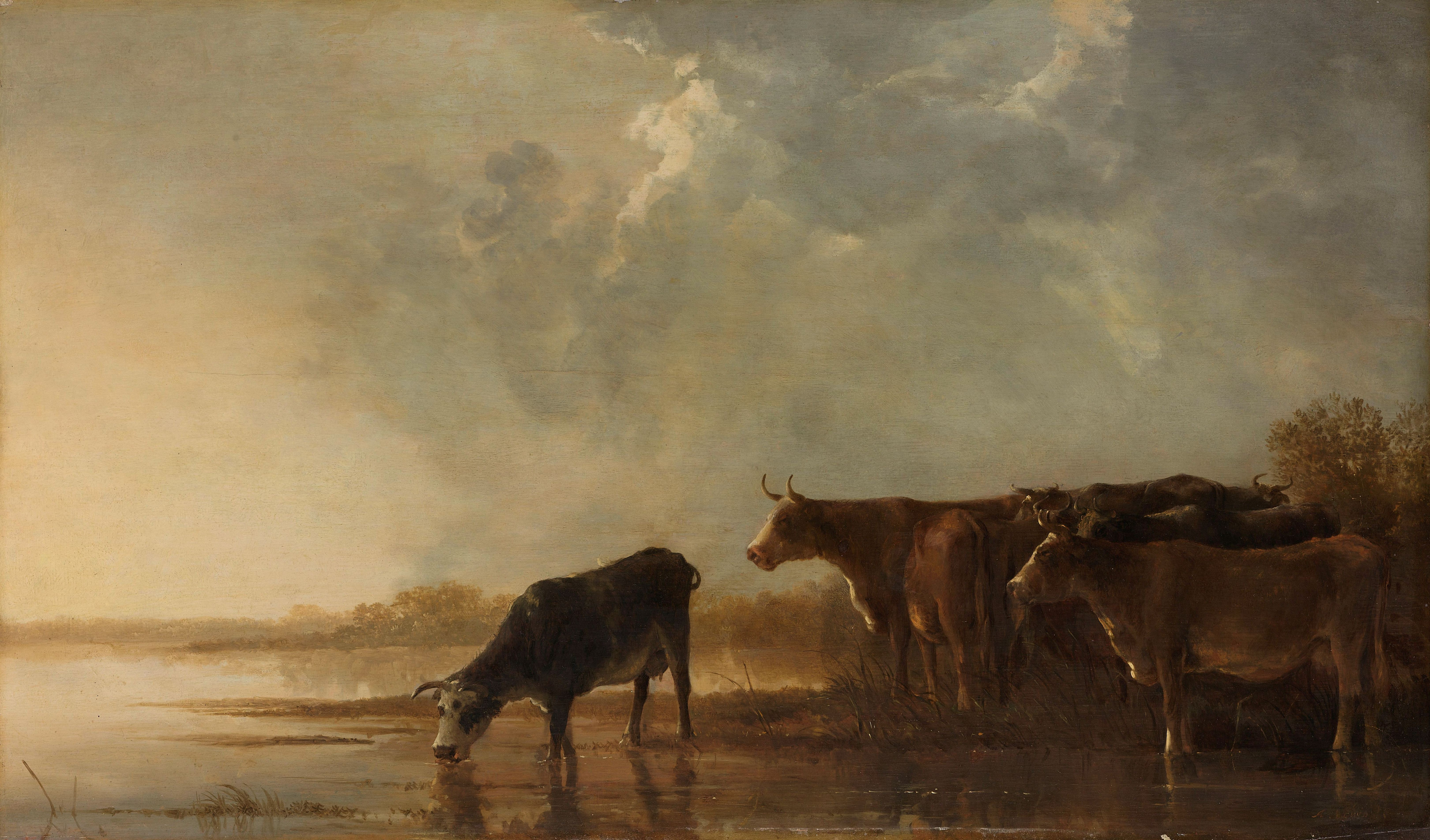 Vlak rivierlandschap, aan de oever van het water staan enige koeien, het meest linkse dier drinkt.